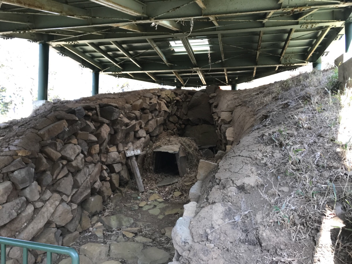 井田松江古墳18号墳